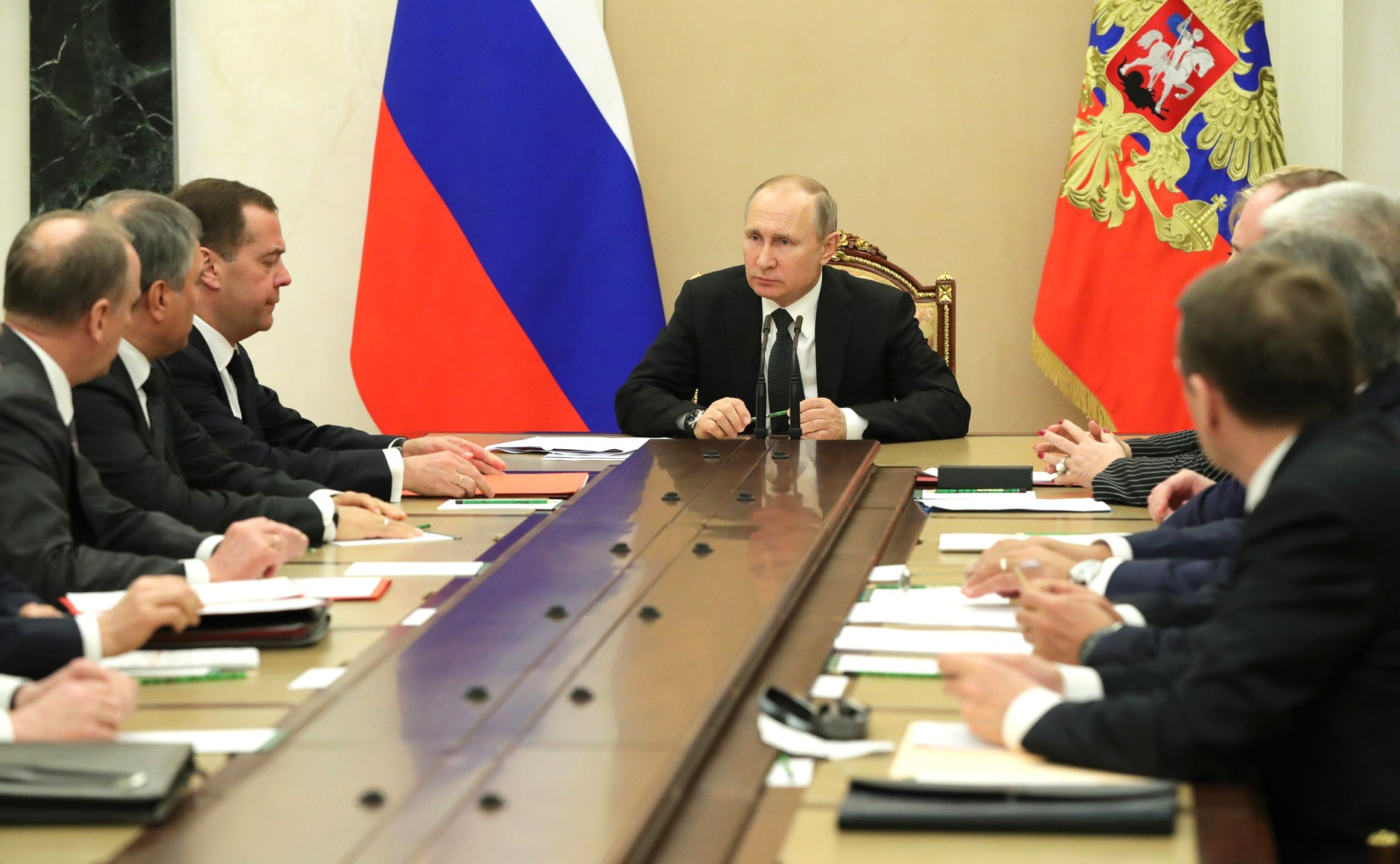 Президент России Владимир Путин проводит совещание с постоянными членами Совета Безопасности России. Состоялся обмен мнениями по внешнеполитической тематике, в том числе в контексте принятых решений о зеркальных мерах в отношении ряда государств, выславших российских дипломатов и закрывших консульские учреждения.